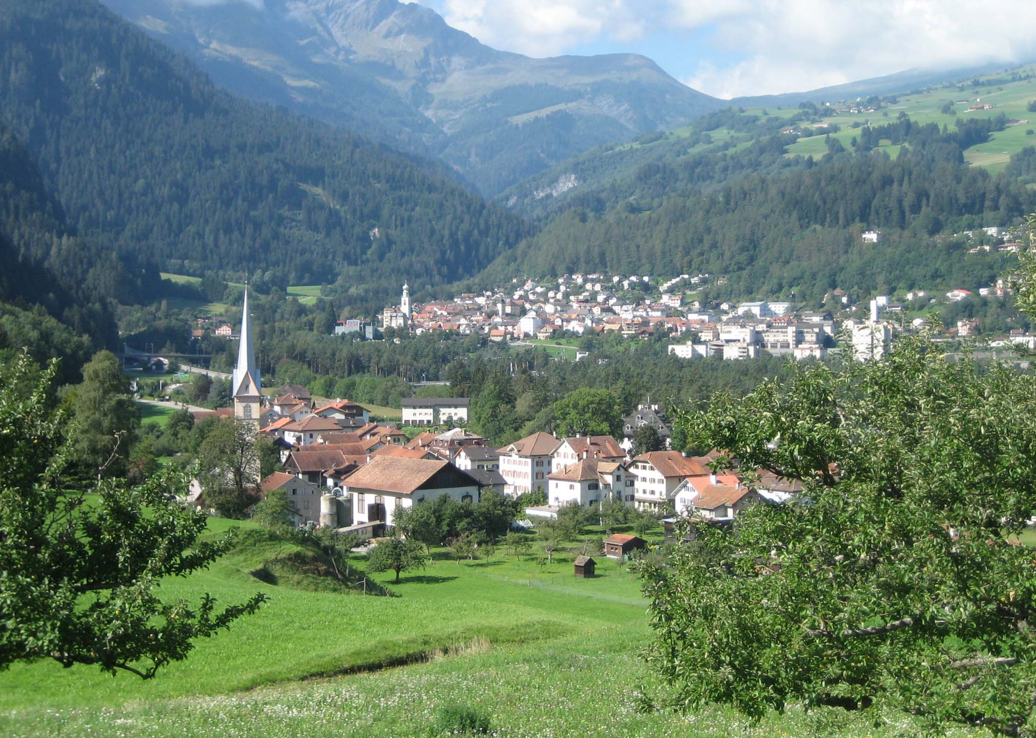 Sils im Domleschg, im Hintergrund Thusis